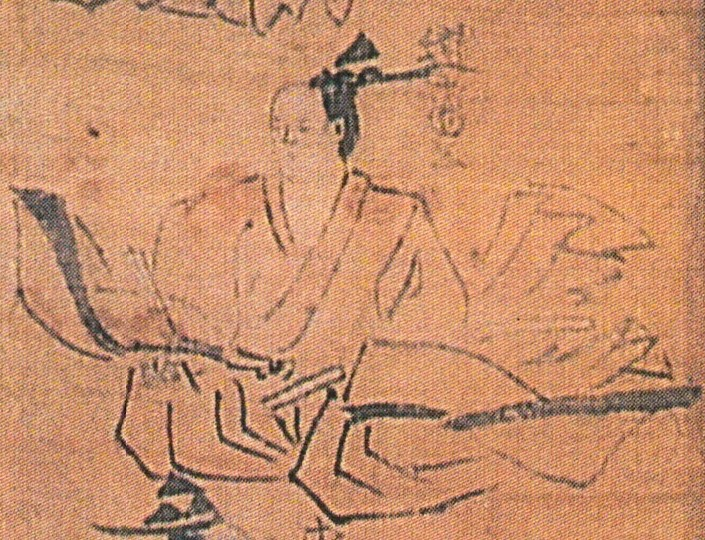 戸沢家16代戸沢道盛の肖像画(戸沢家歴代肖像より)。